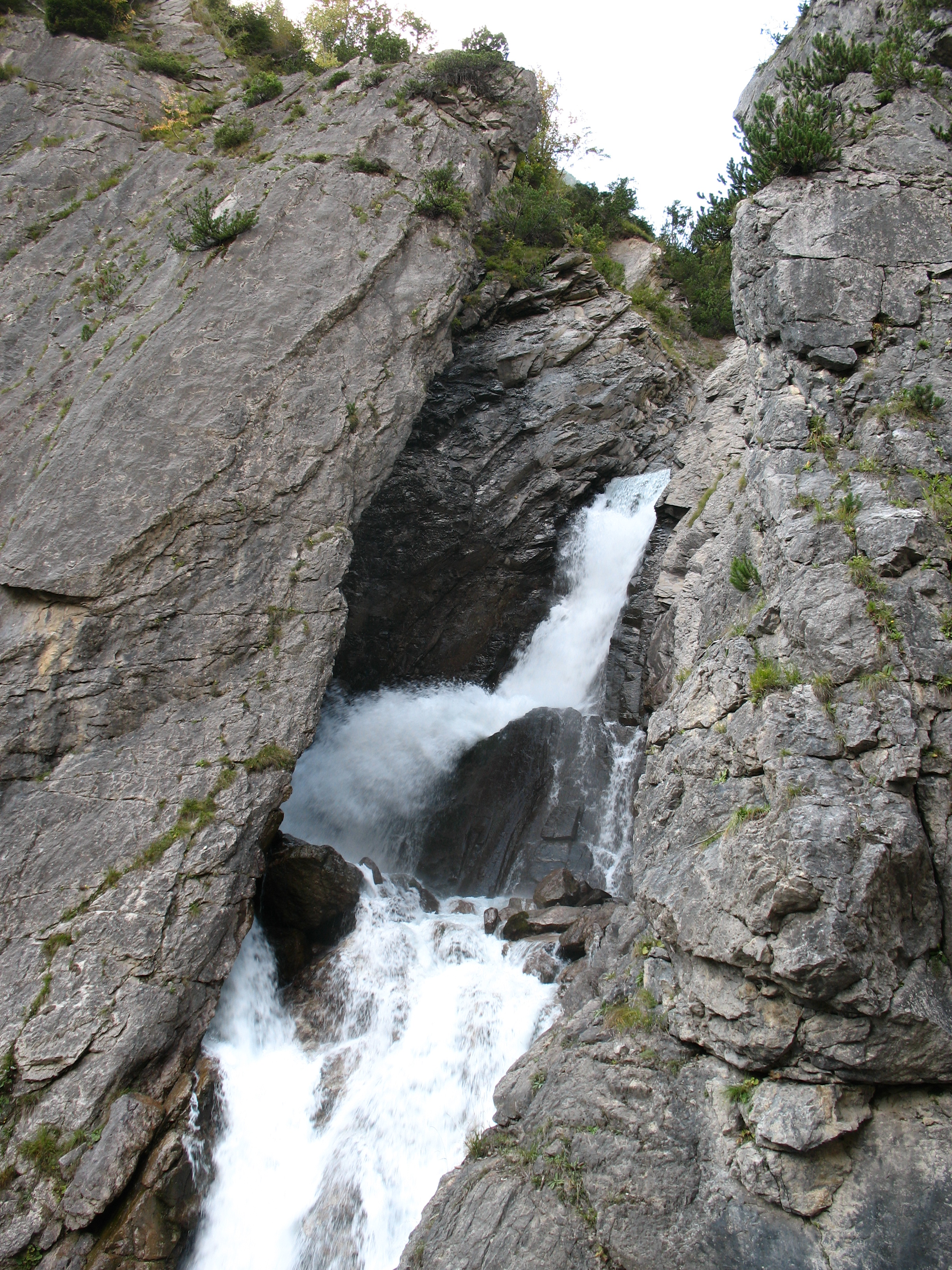 Abschnitt des Simms-Wasserfalls im Verlauf des Höhenbachs in den Allgäuer Alpen.